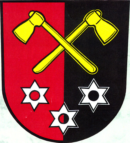 Znak obce Ostružná (okres Jeseník)